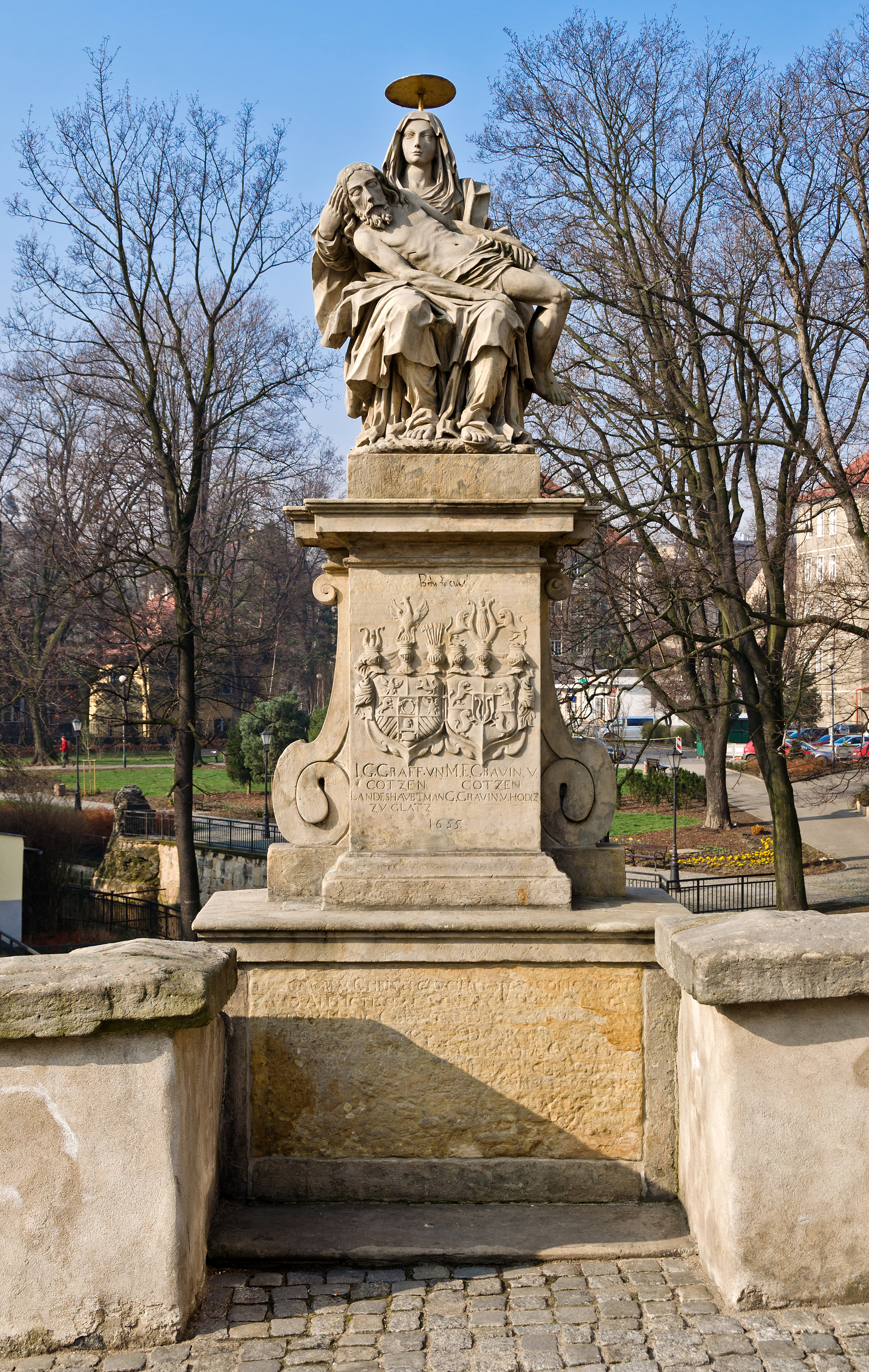 Kłodzko, most na młynówce, kon. XIV, 1628, 1701, 1750